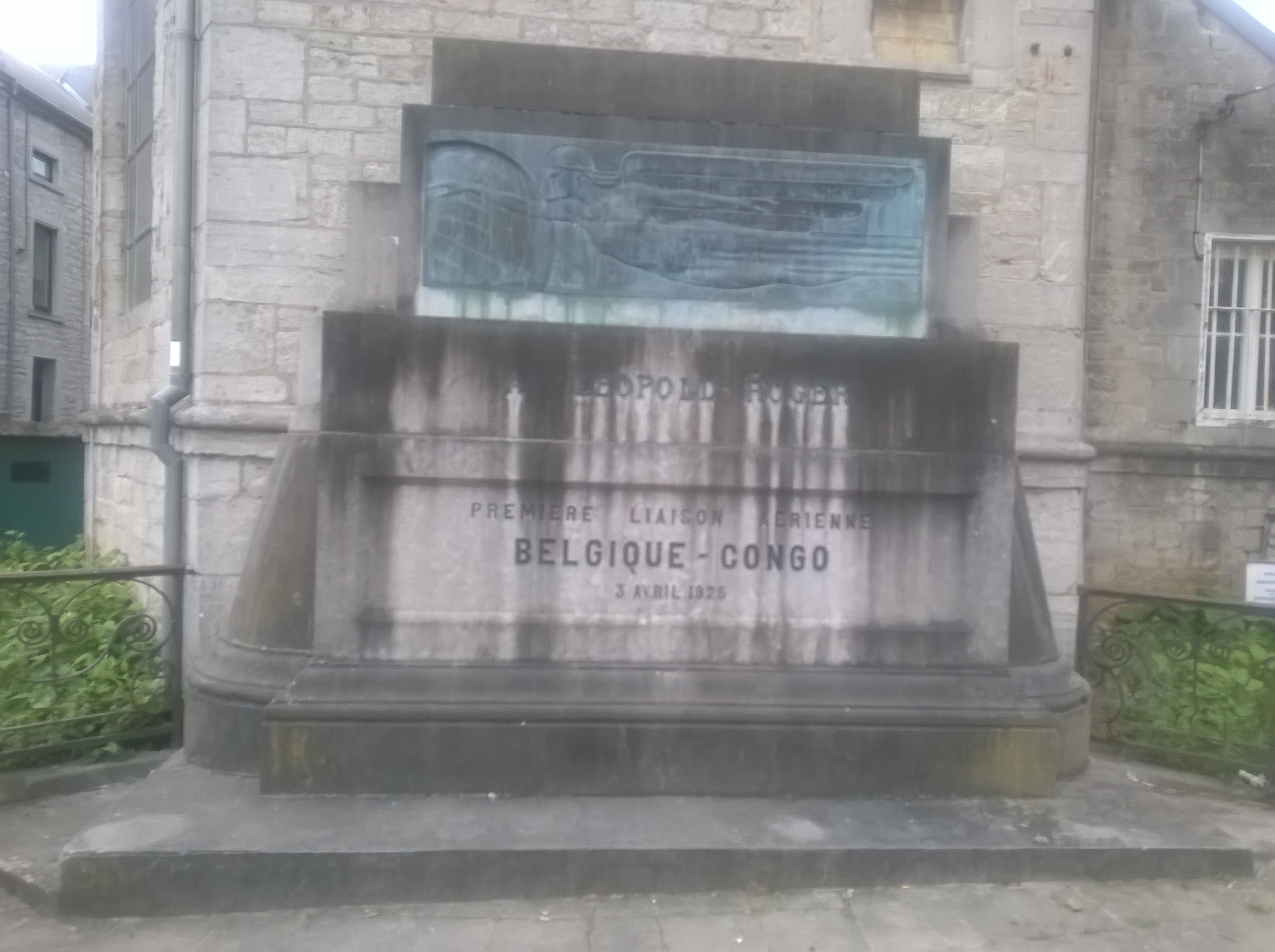 Derrière l' église de Mariembourg côté gare.